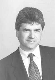 politico italiano